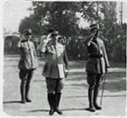 le pays de france N° 221 page 11_ les généraux Nérel _Monbelli à_Kustendil en Bulgarie.